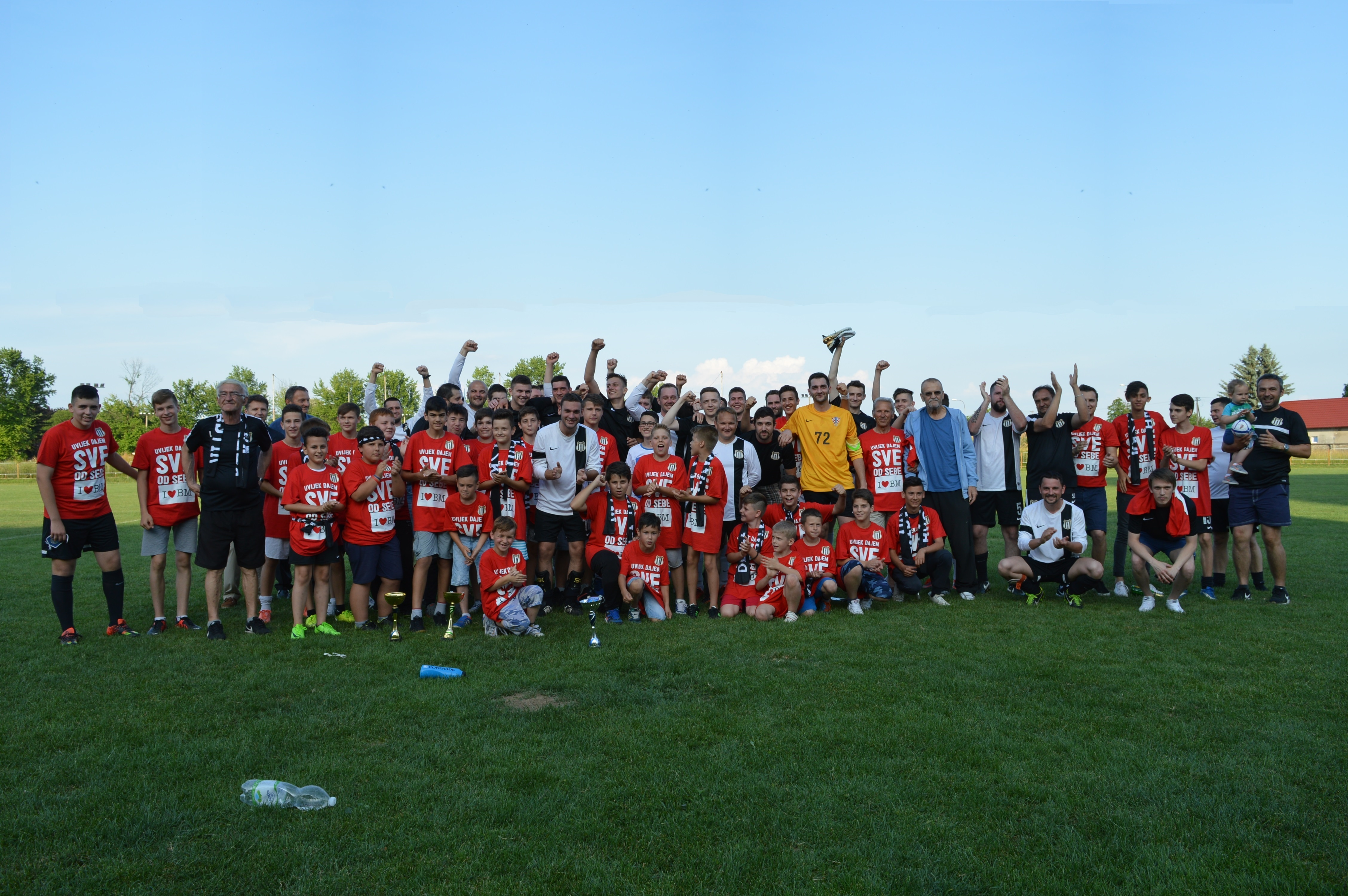 Srpskohrvatski / српскохрватски: Igrači i treneri NK Šparta na proslavi naslova prvaka 3. lipnja 2016. godine. Seniora, stariji pioniri i mlađi pioniri u svojim su doobnim kategorijama osvojili natjecanja i zajedničkom proslavom bilježili važan dan za klub.